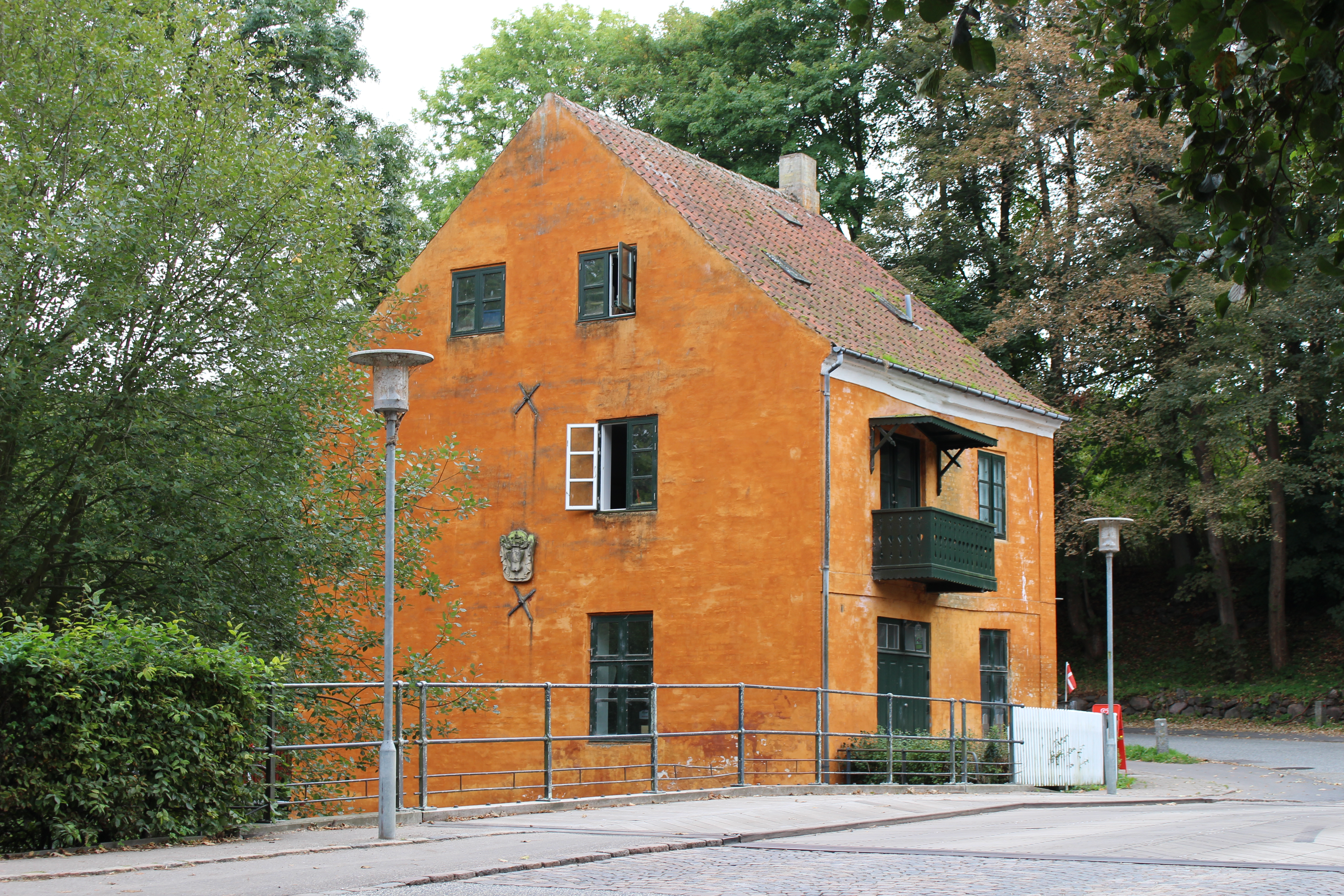 Strømhuset, Lyngby Taarbæk. Bevaringsværdig bygning med BBR-nummer 173-44089-2.